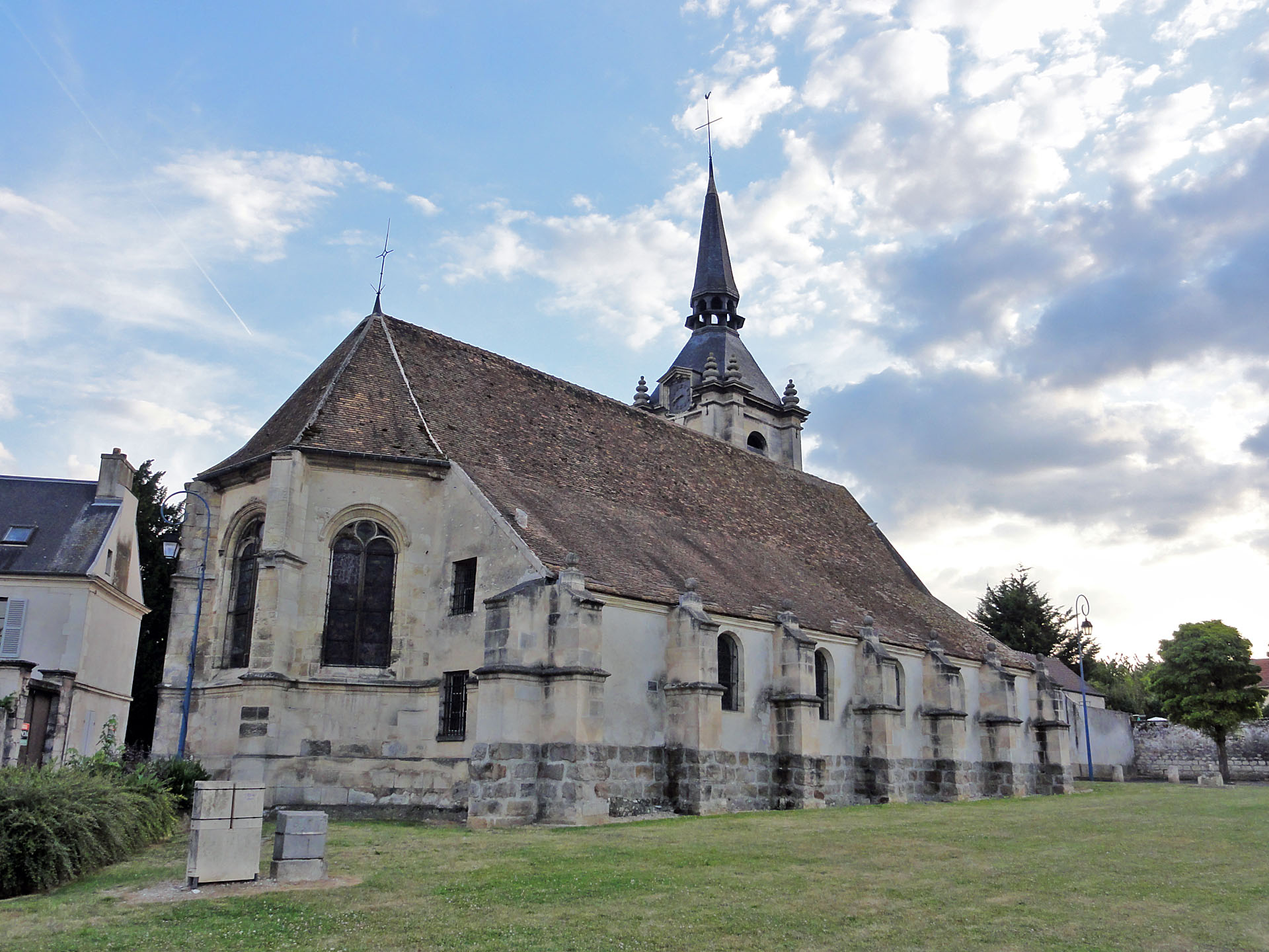 L'église Saint-Denys du Thillay, Val-d'Oise, France.